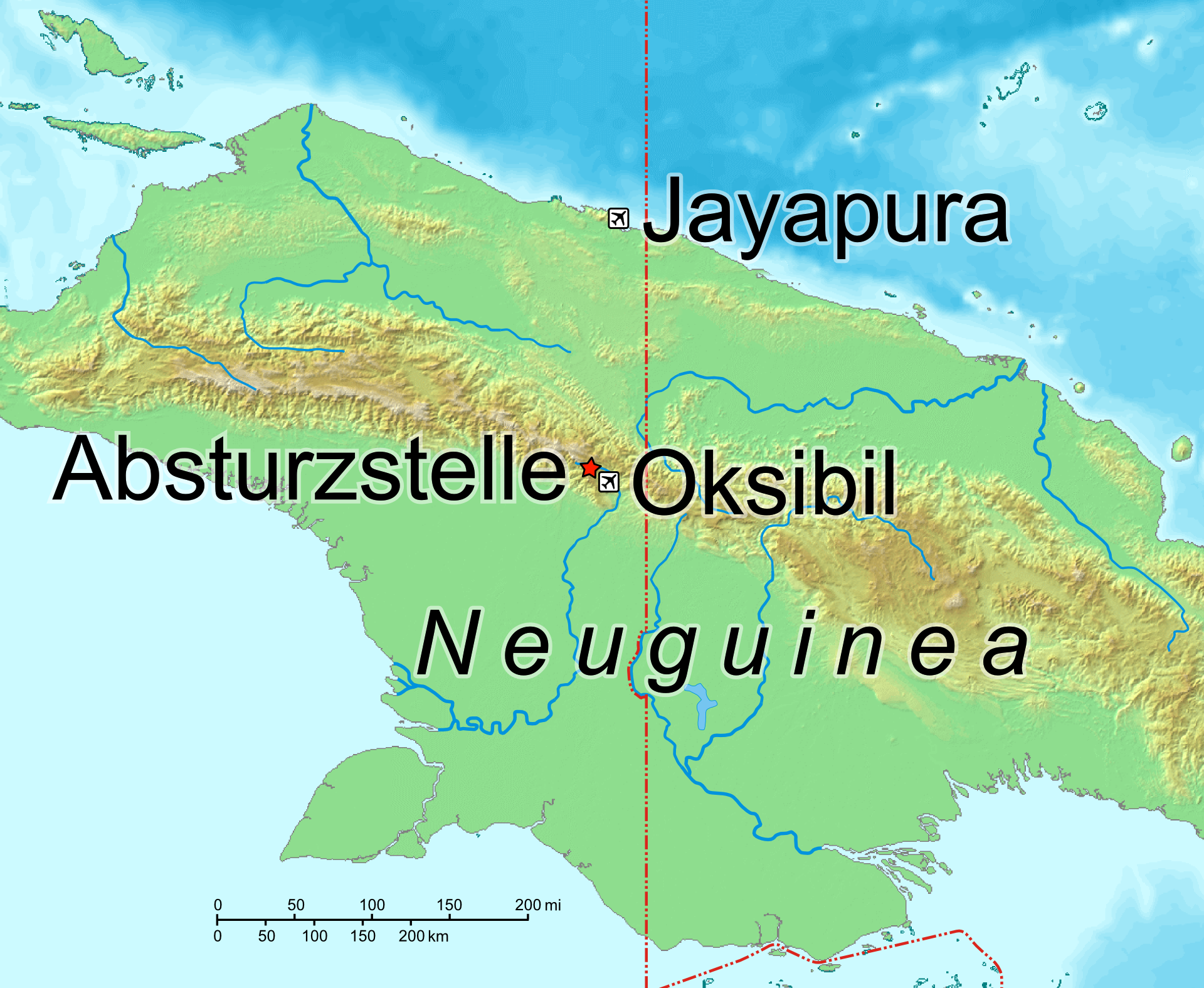 Karte von Neuguinea mit Start- und Zielflughafen von Flug IL267 Absturzstelle (-4.821483°, 140.499217°) von Flug IL267